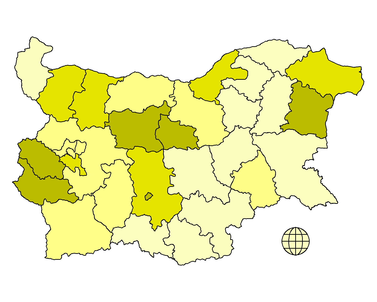 Гласуване по райони за Национално движение Симеон Втори на парламентарните избори през 2005. Всеки от цветовете съответства на приблизително 1/4 от подадените гласове По тъмният цвят съответства на получен по-голям процент от гласовете